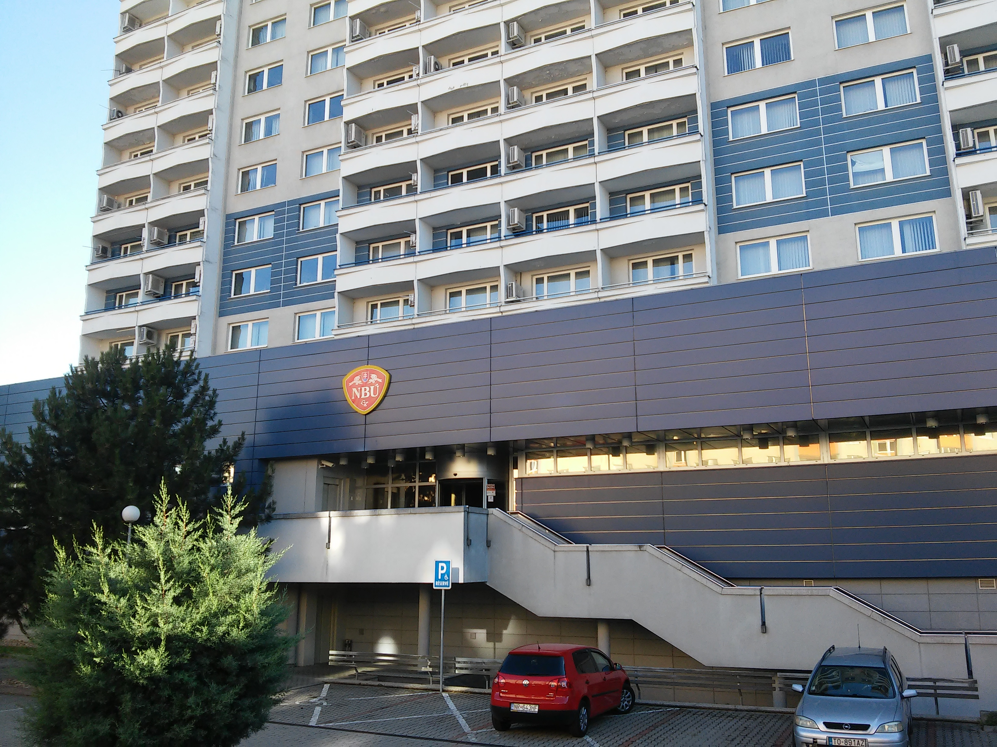 Budatínska 30, Petržalka, Bratislava